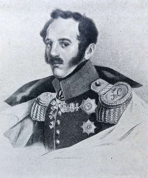 Генерал от кавалерии, состоящий при особе Его Величества, граф Иван Осипович Витт. Данное изображение также было использовано в статье «Витт, Иван Осипович, граф» опубликованной в шестом томе «Военной энциклопедии», который был издан книгоиздательским товариществом Ивана Дмитриевича Сытина в 1912 году в столице Российской империи городе Санкт-Петербурге.